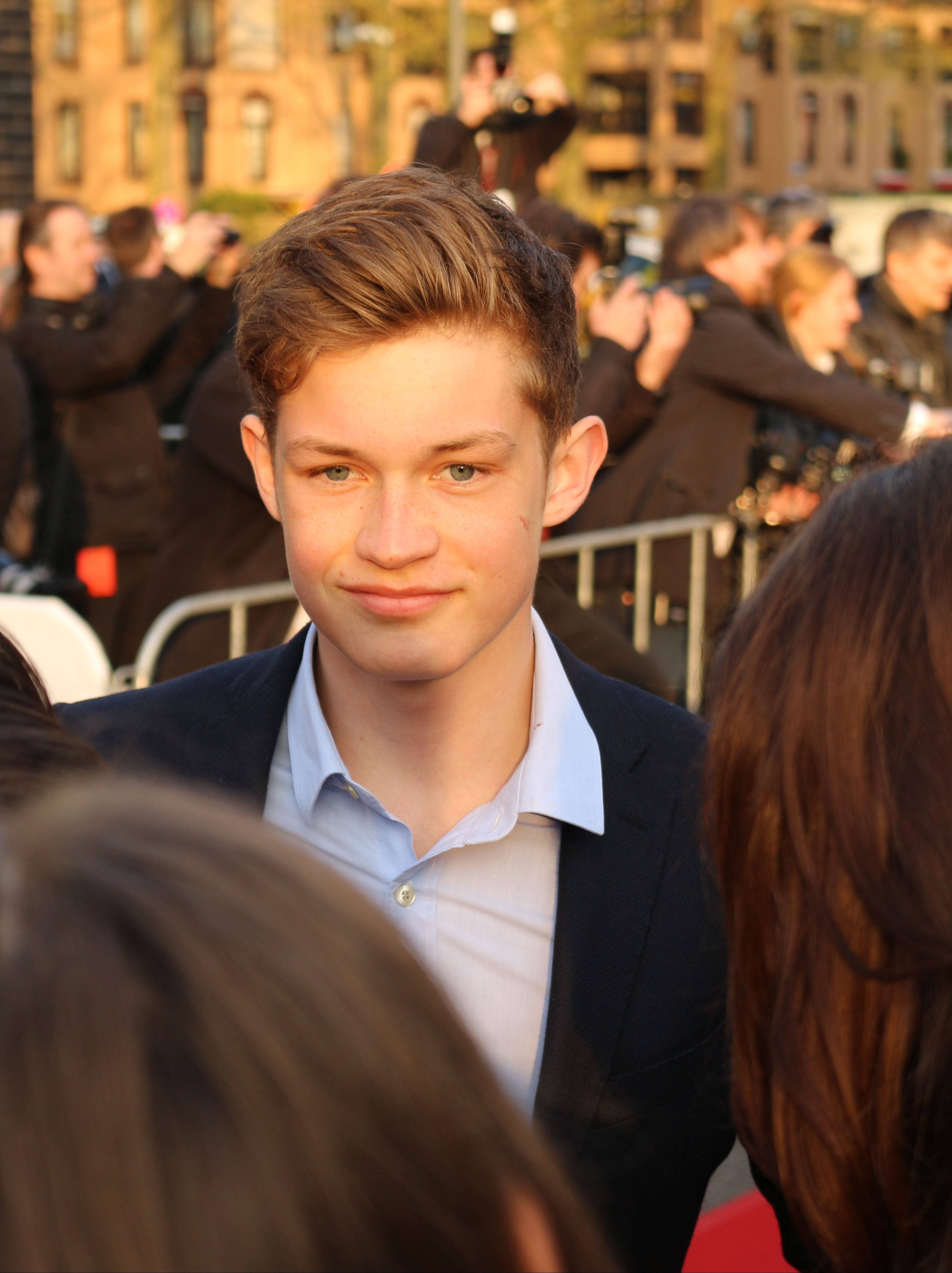 Schauspieler Damian Hardung bei der Grimme-Preis-Verleihung 2016 in Marl/Westf.